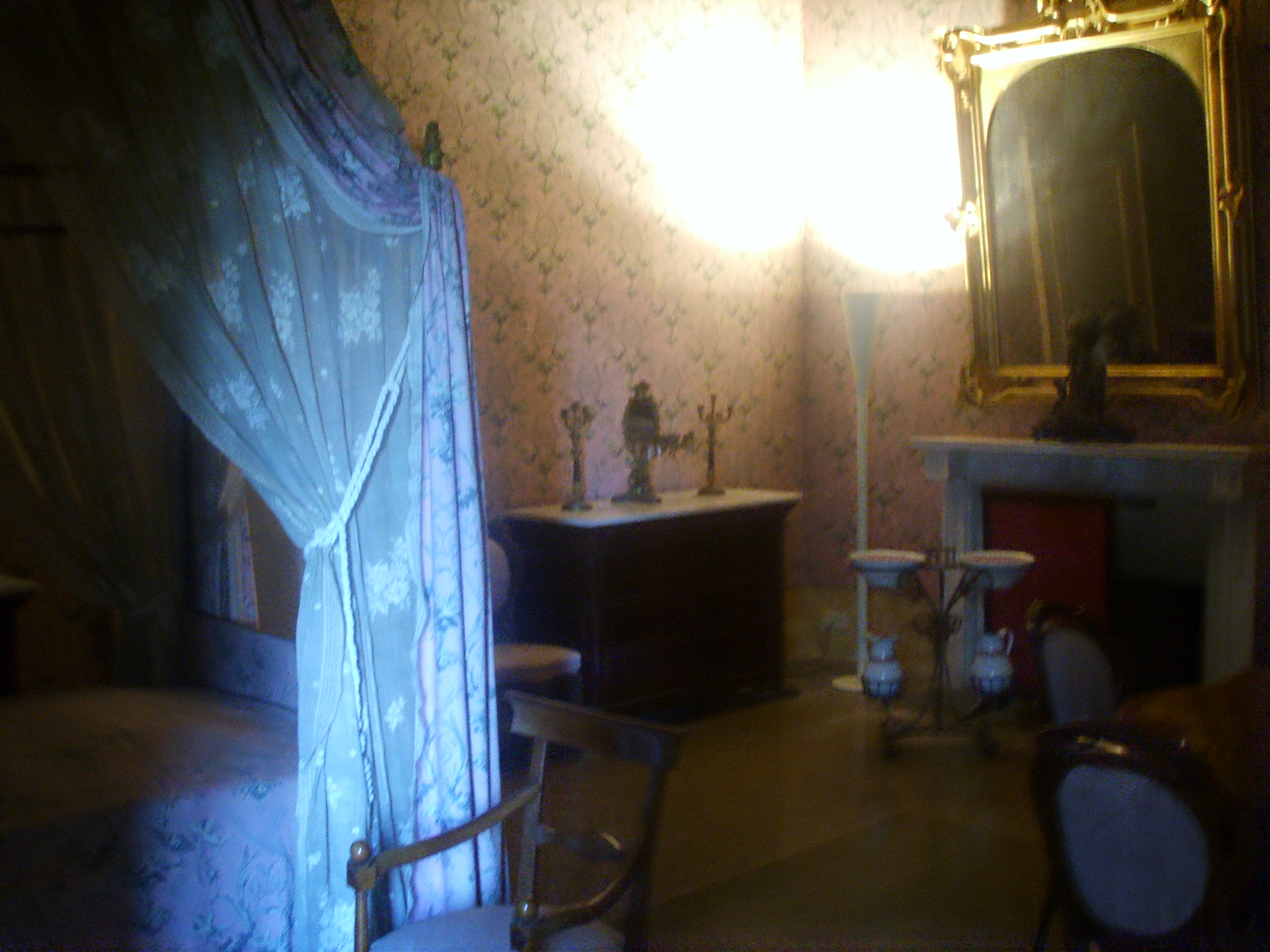 Villa medicea di Poggio a Caiano, inside Bella Rosina sleeping room in Poggio a Caiano, Italy